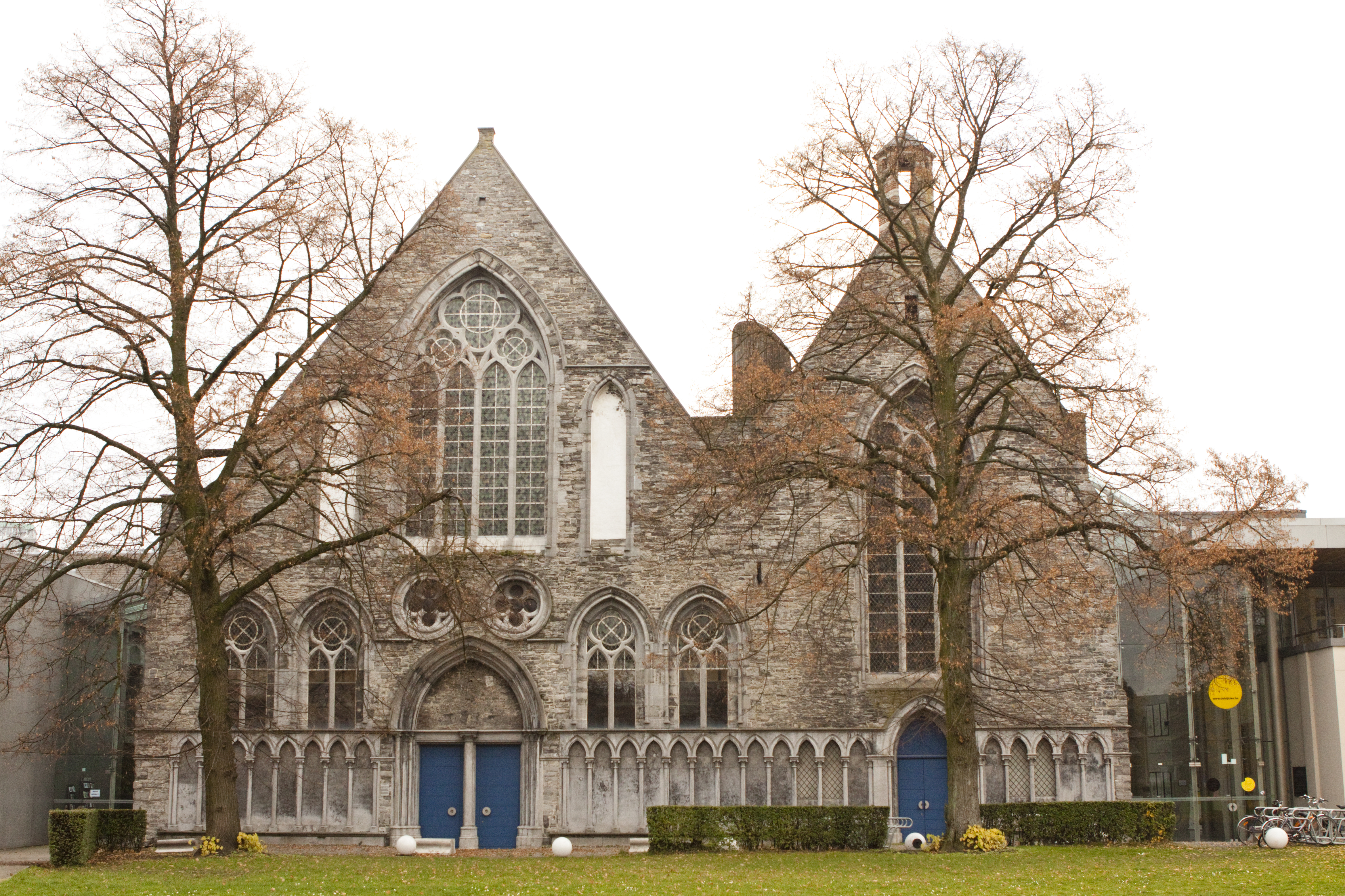 Bijlokeabdij - 13e eeuwse ziekenzaal en kapel.